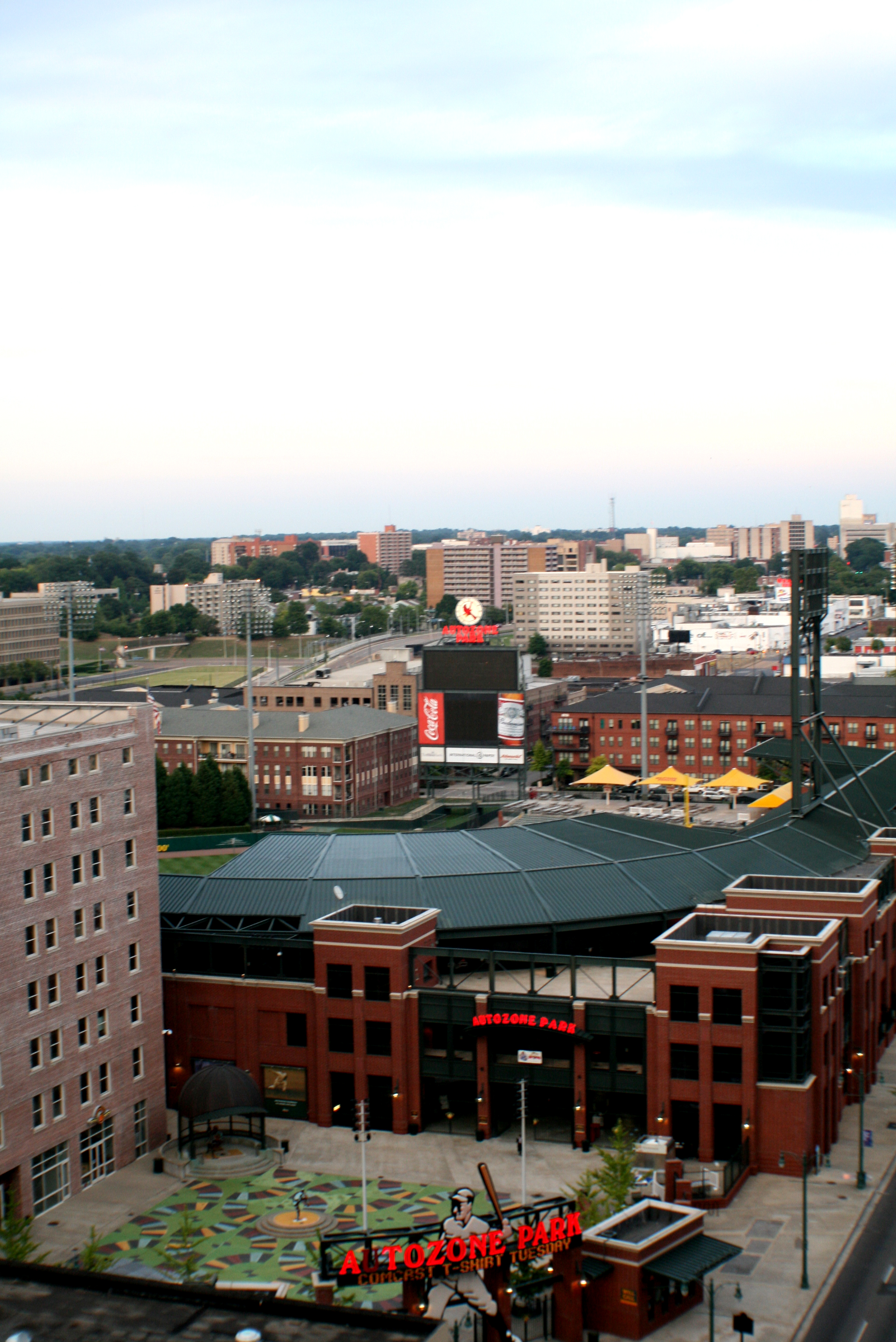 AutoZone Park auteur : theogeo